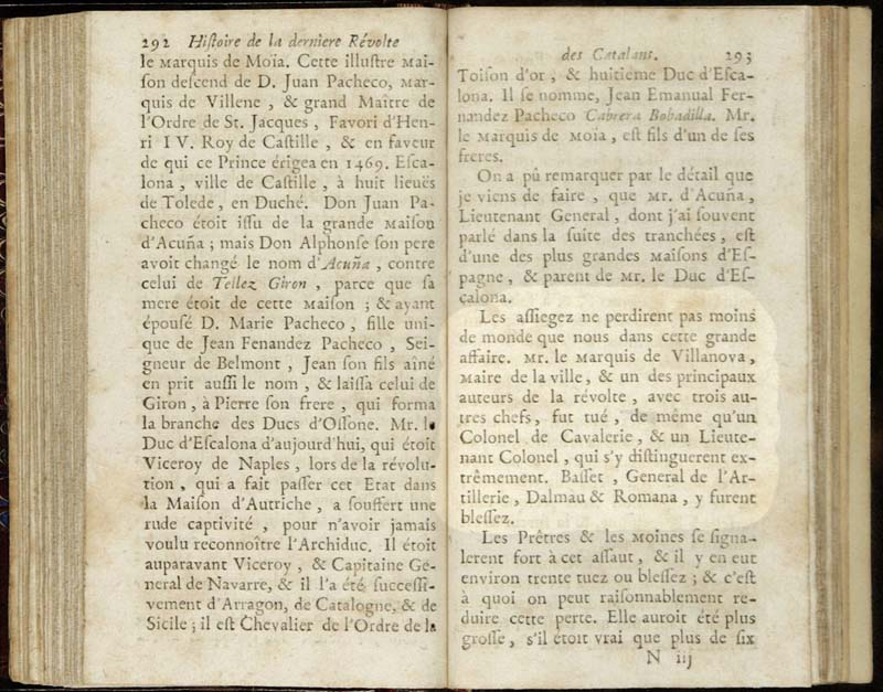 Histoire de la derniere revolte des catalans et du siege de Barcelonne